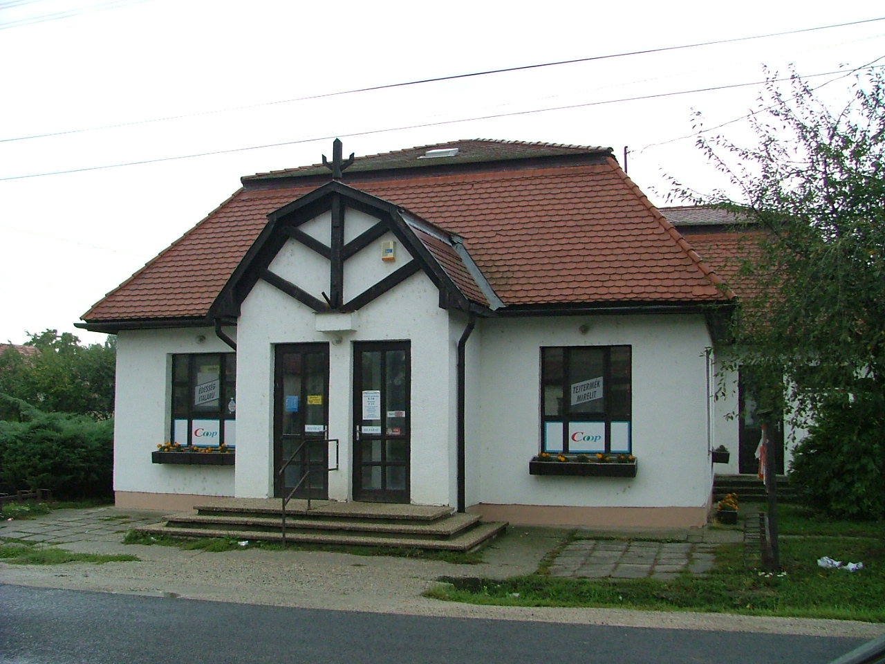 Fertőendrédi faluház